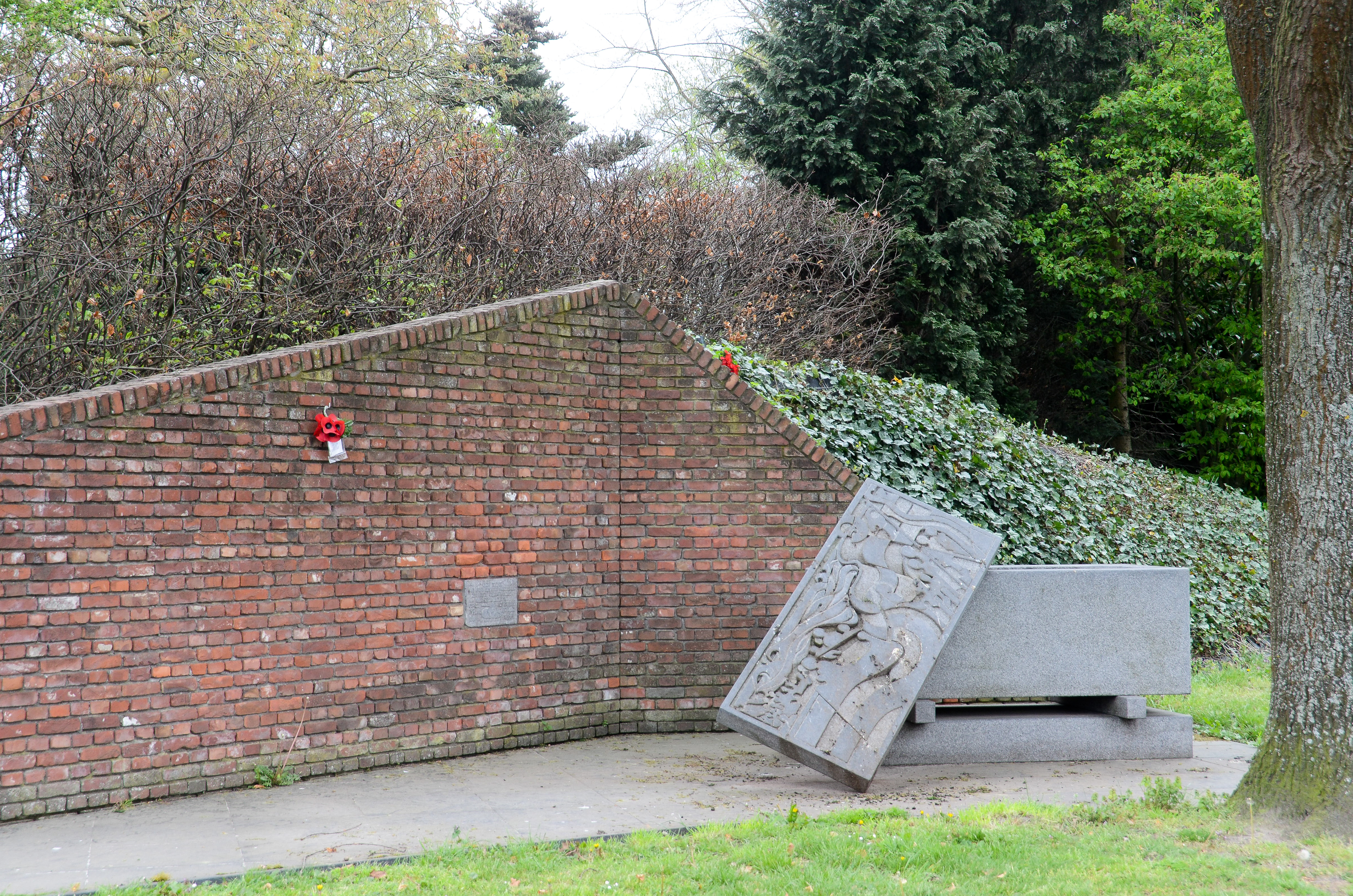 Nuenen, oorlogsmonument "Wederopstanding is bevrijding"